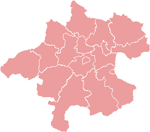 Karte: der Bezirksgliederung Oberösterereichs Lizenz: GNU FDL Quelle: Zeichnung plp Datum: 2004 Ort: Wien 22:51, 6. Apr 2004 Plp 300 x 265 (4220 Byte)